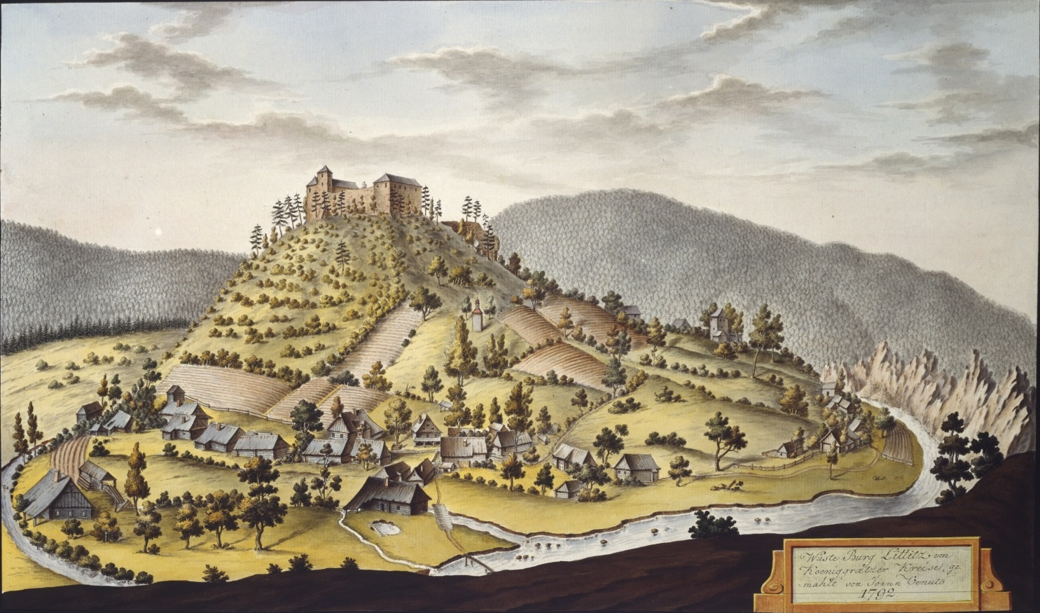 Litice (hrad). Wüste Burg Littitz im Koeniggraetzer Kreise, gemahlt von Joann Venuto 1792